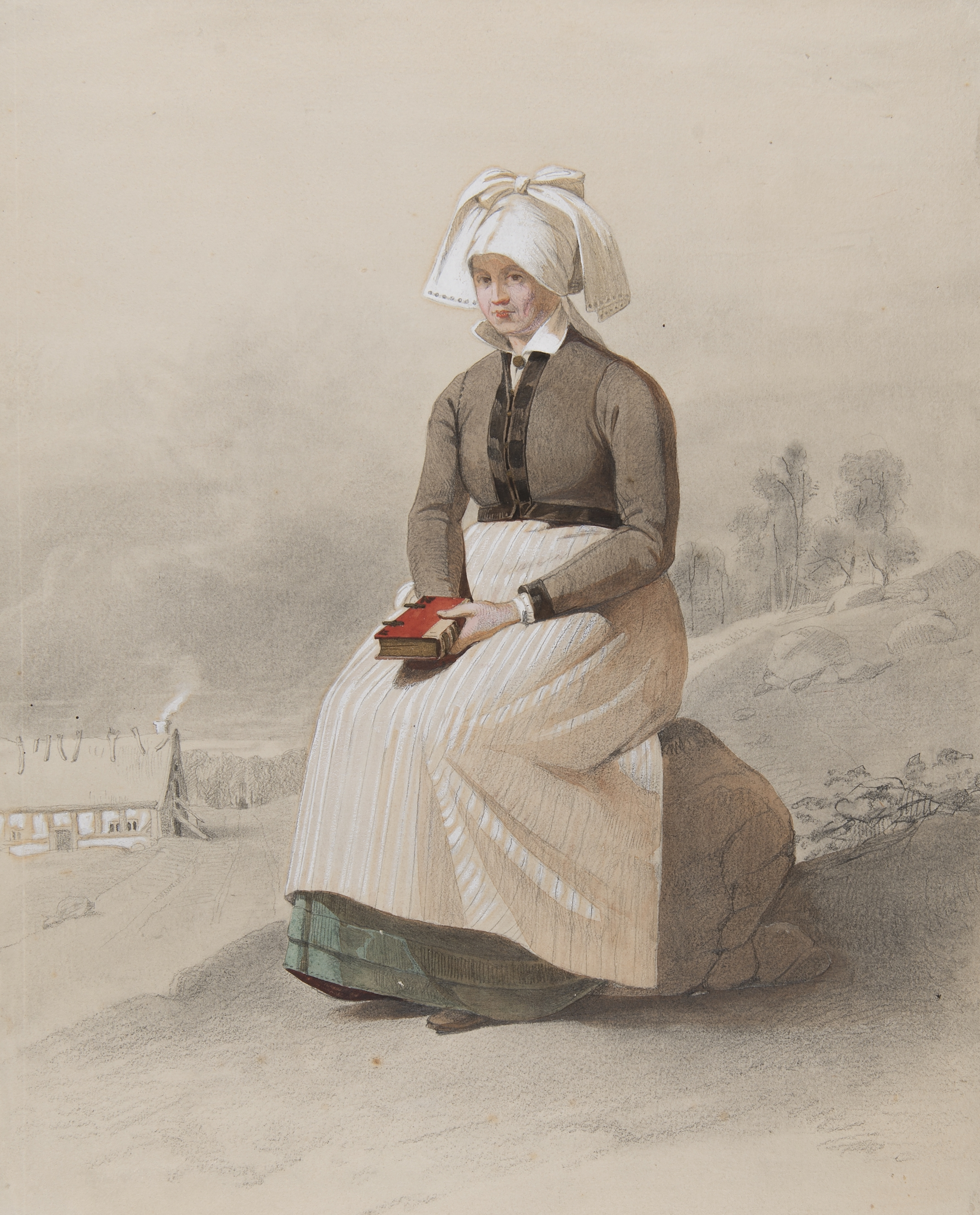 Kvinna i dräkt, sittande i helfigur. Akvarell i storformat av Otto Wallgren Depicted place: Q3591215 (Q3591215) (Härad), Scania (Q180756)